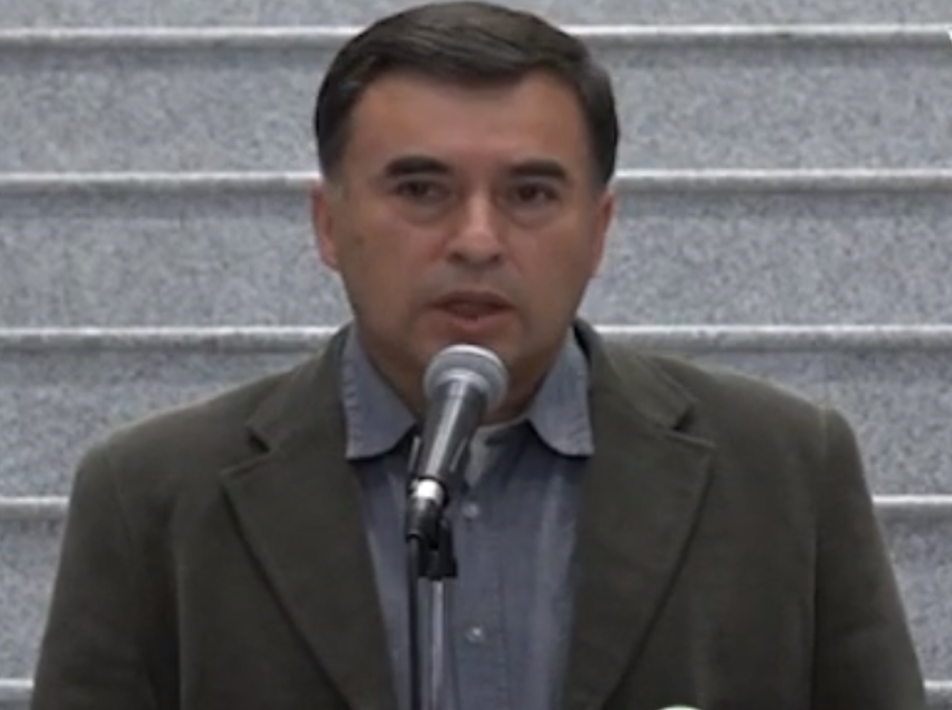 Ministro Juan Ramon Quintana en conferencia 2019